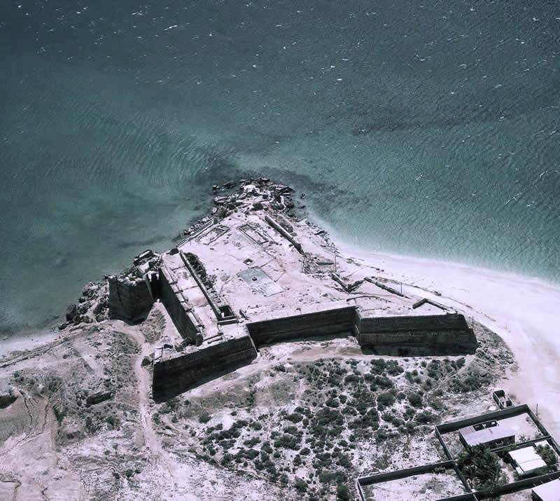 Vista Aérea del Castillo de Santiago de Arroyo de Araya. Tomada en el 2007.